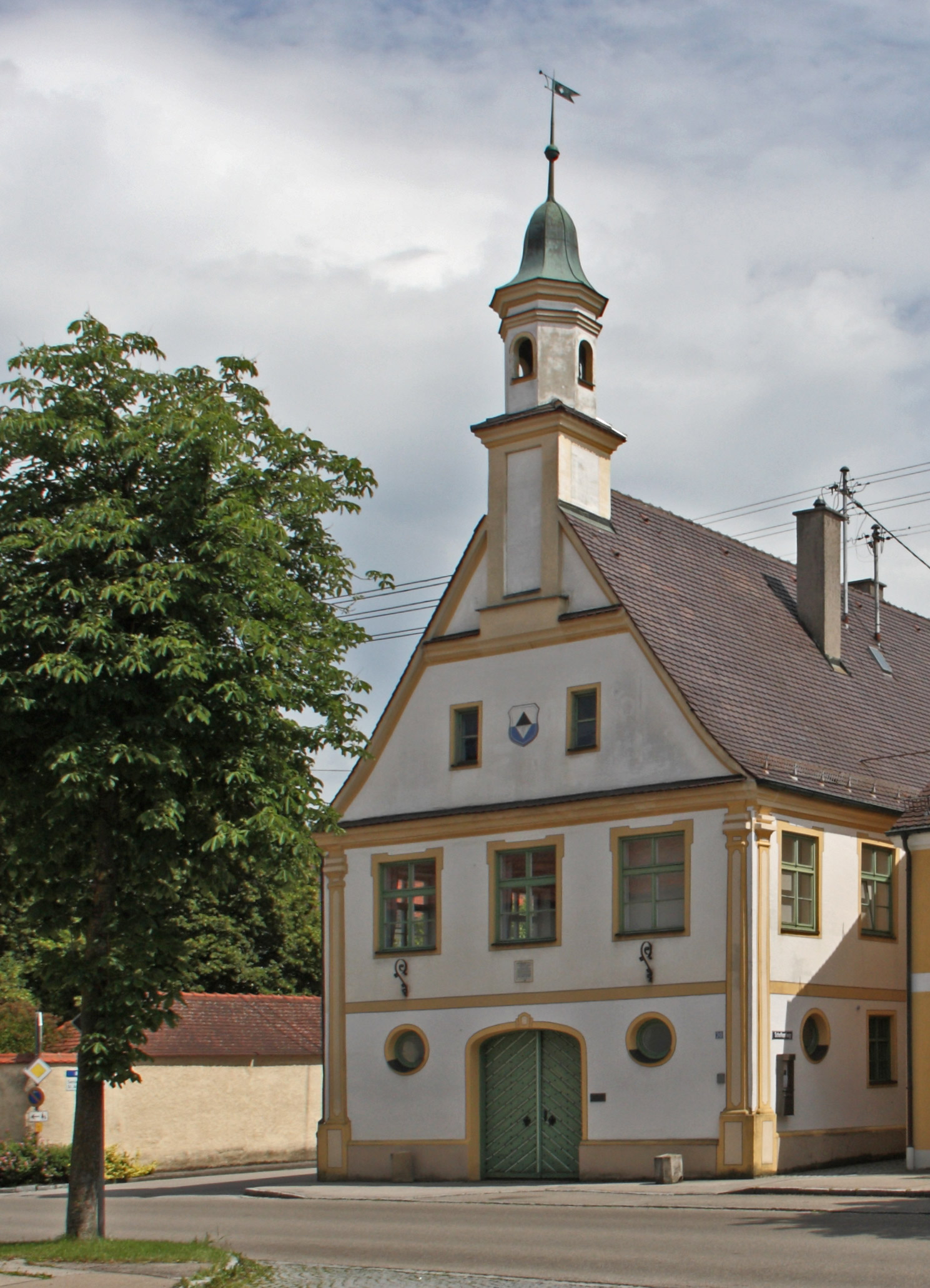 Nordwestansicht des alten Rathauses an der Hauptstraße 30